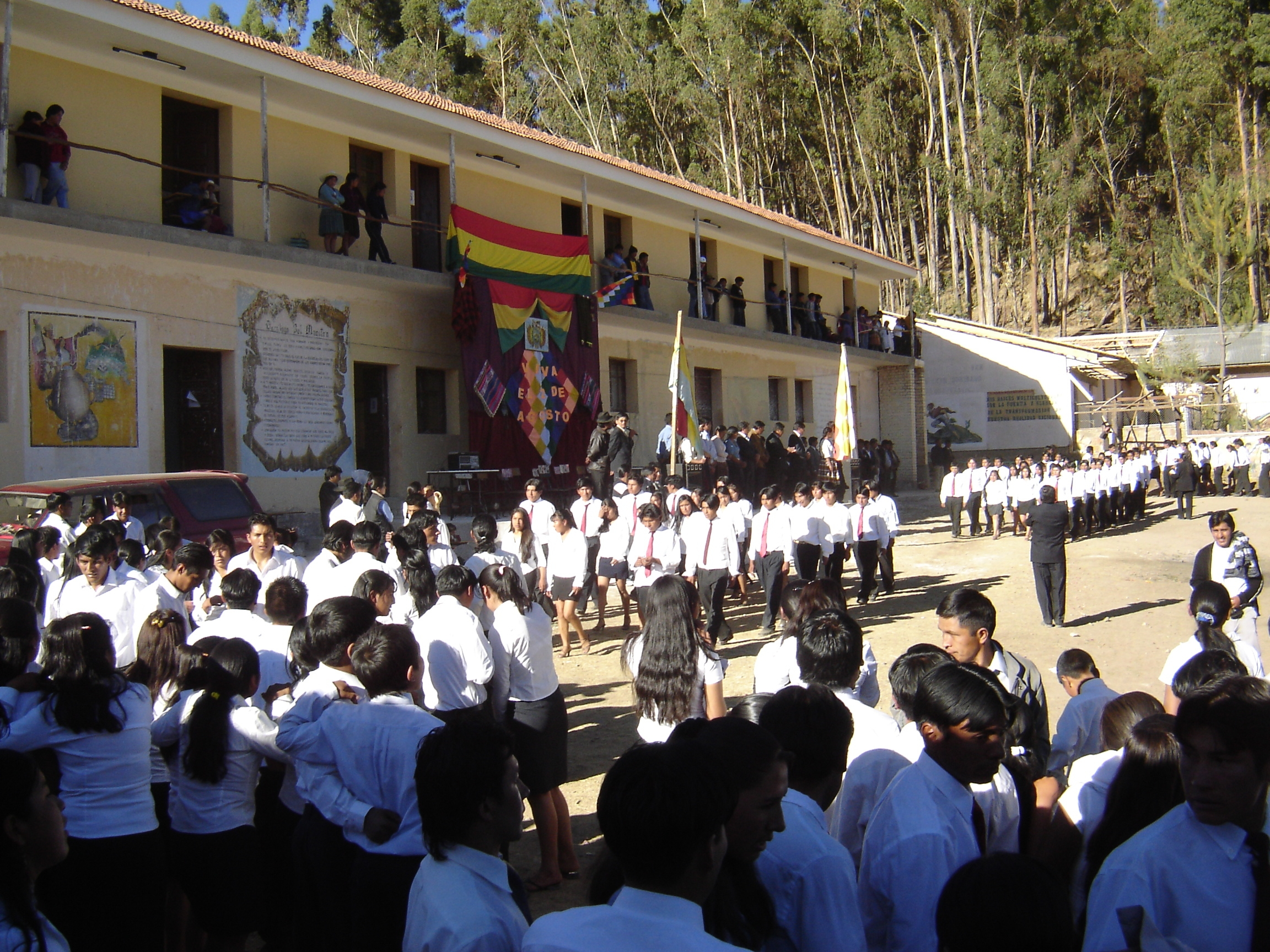 Desfile de los alumnos del Instituto Normal Superior Ismael Montes, el 2 de agosto de 2008, en homenaje al Día del Campesino.